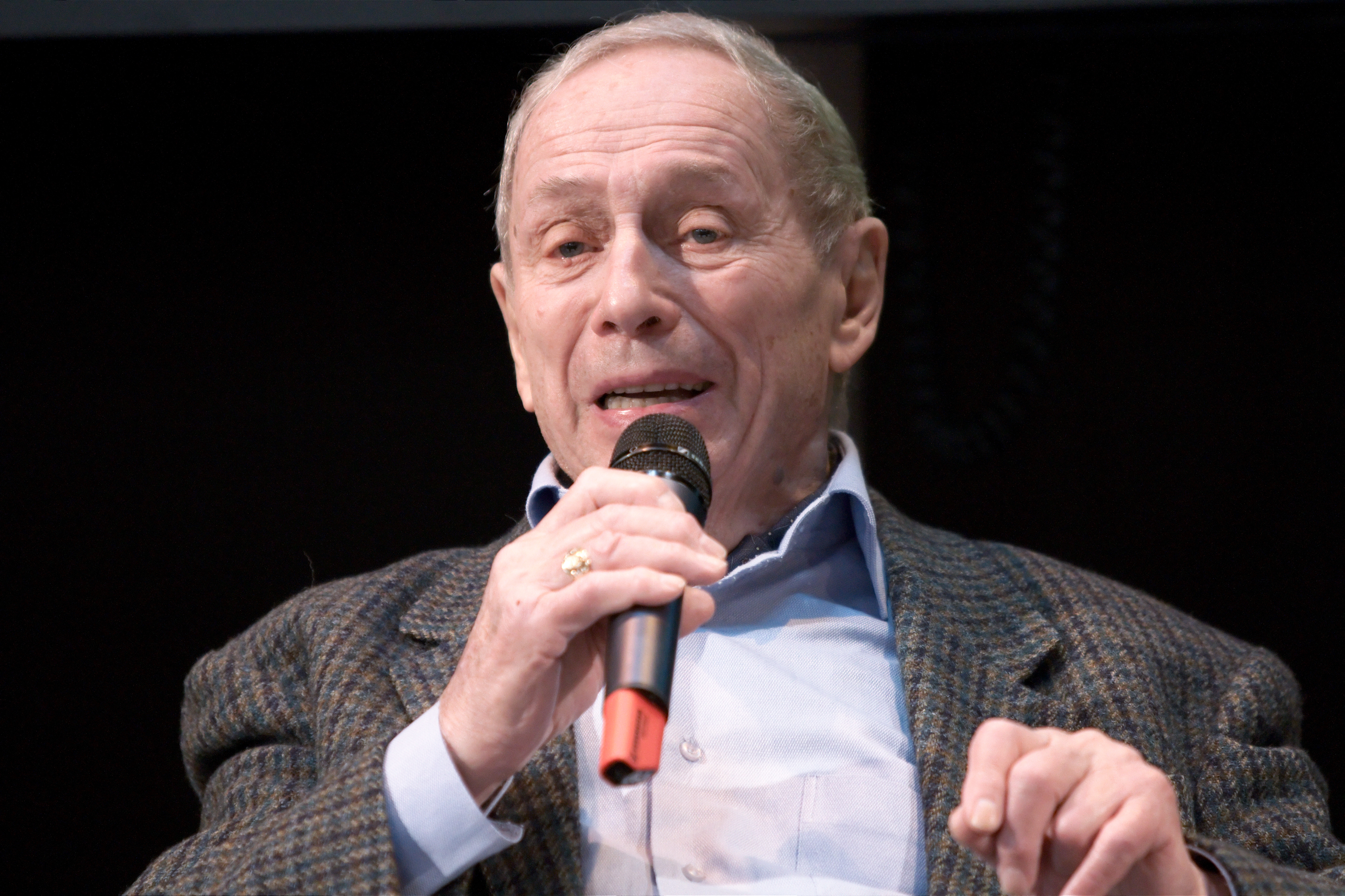 L'ethnologue et sociologue français Georges Balandier au Salon du livre de Paris lors de la conférence La société, source d’inspiration.